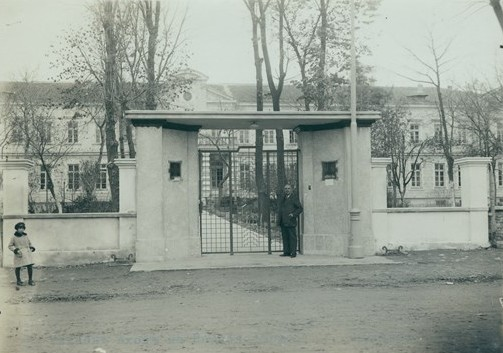 Главният вход на Варненската държавна първостепенна болница